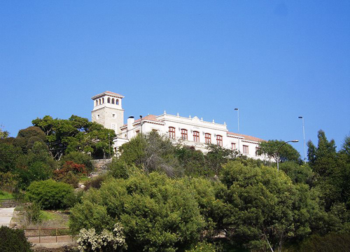 Universidad_de_La_Serena_campus_en_Colina_el_Pino